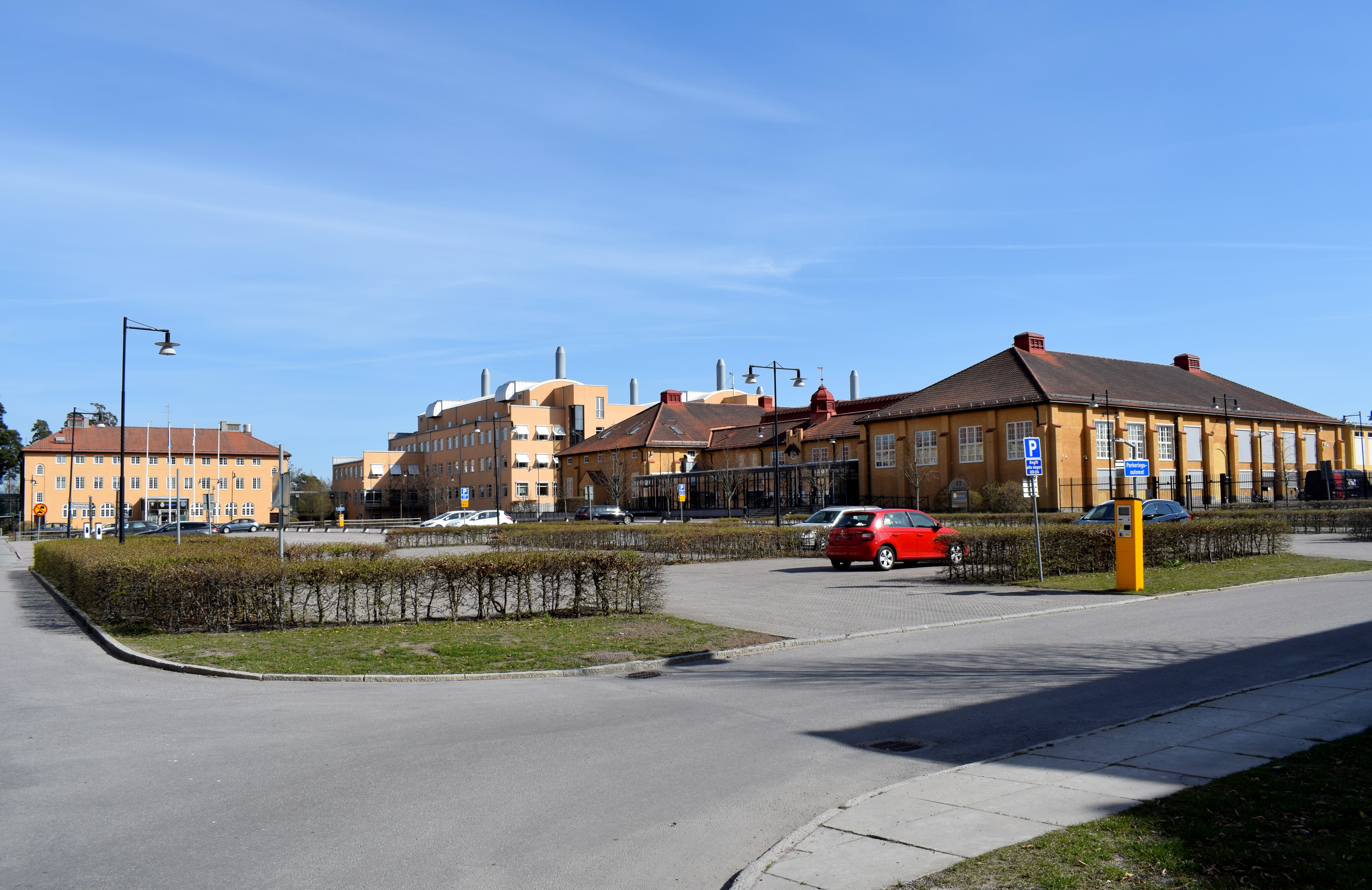 Före detta matsalsbyggnad vid östra delen av dubbelkasernetablissementet i Linköping. Matsalsbyggnaden uppfördes ursprungligen för Första livgrenadjärregementet.